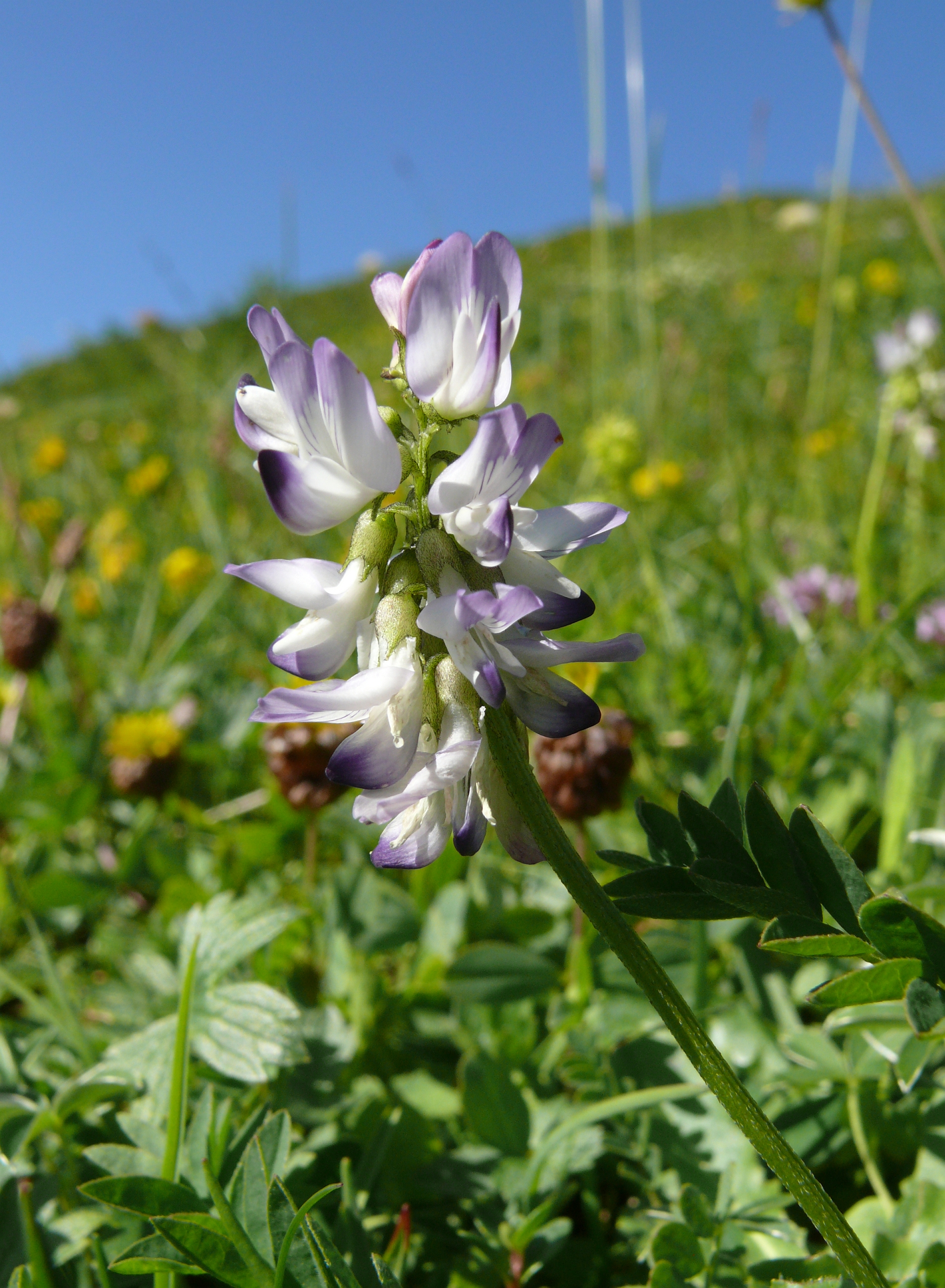 Astragalus alpinus, Allgäuer Alpen, Deutschland